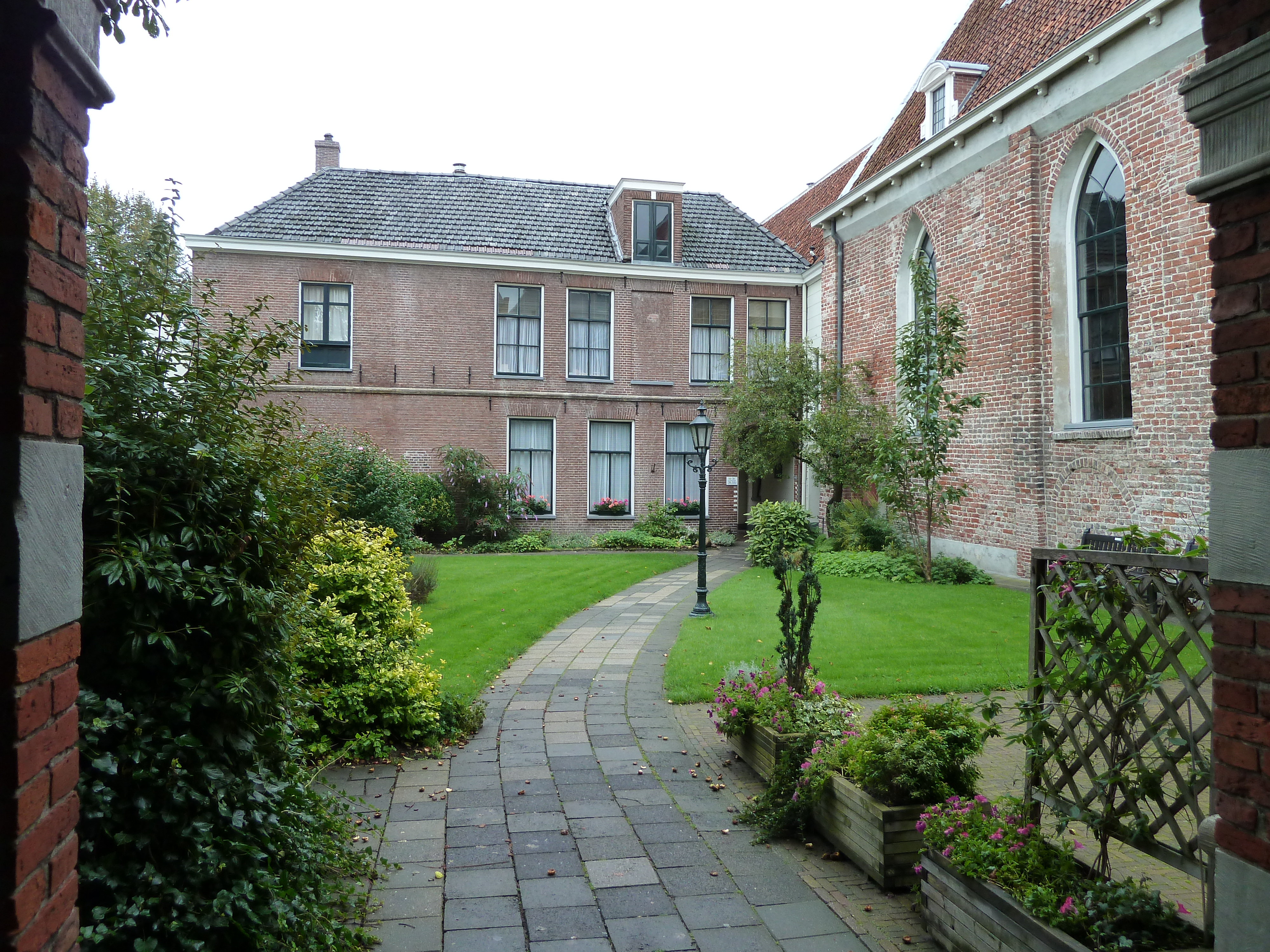 Pelstergasthuis (Groningen), voorhof.